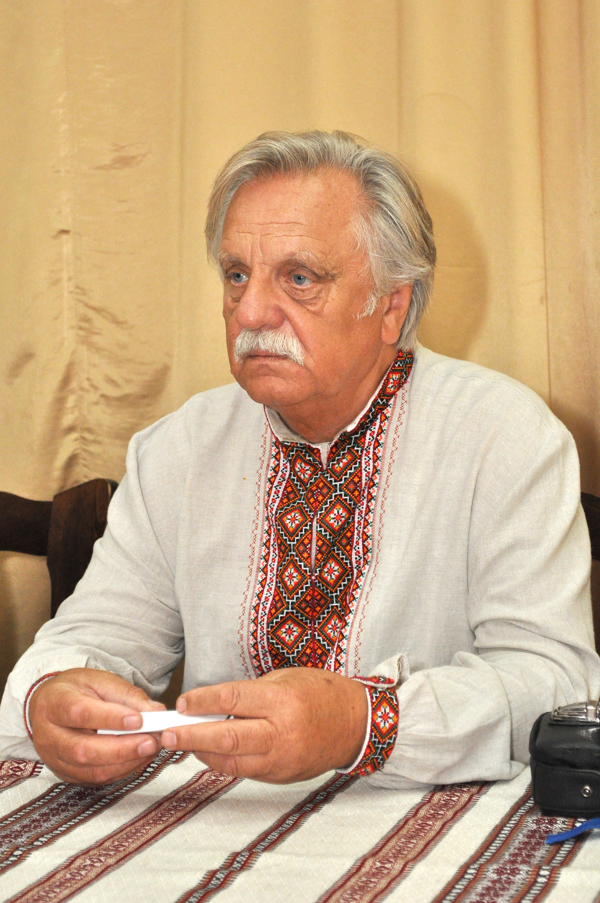 Український поет, політик, громадський діяч, член Міжнародного ПЕН-клубу Микола Горбаль.